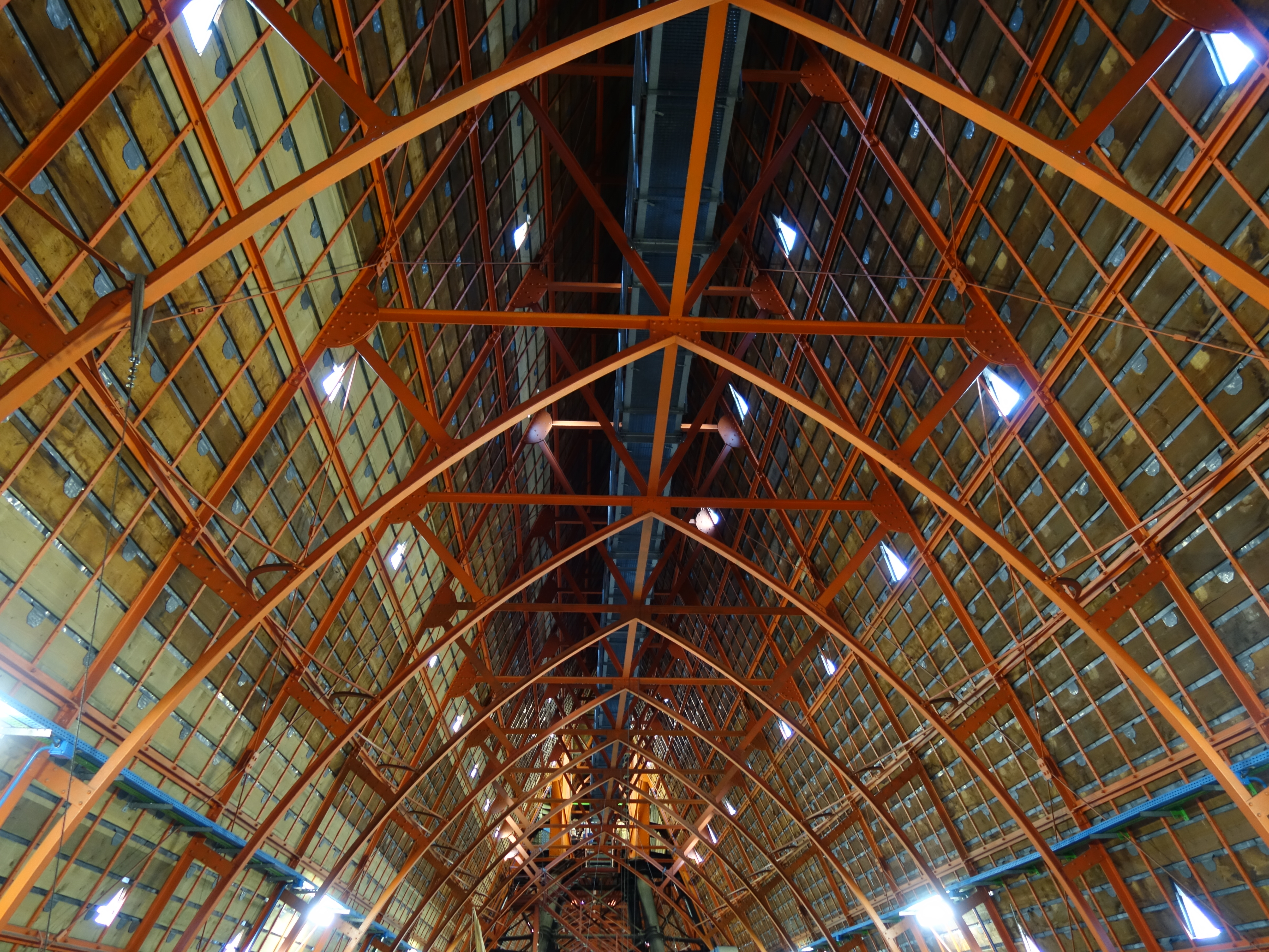 Innenansicht Dachstuhl Kölner DomThis is a photograph of an architectural monument., no. 911